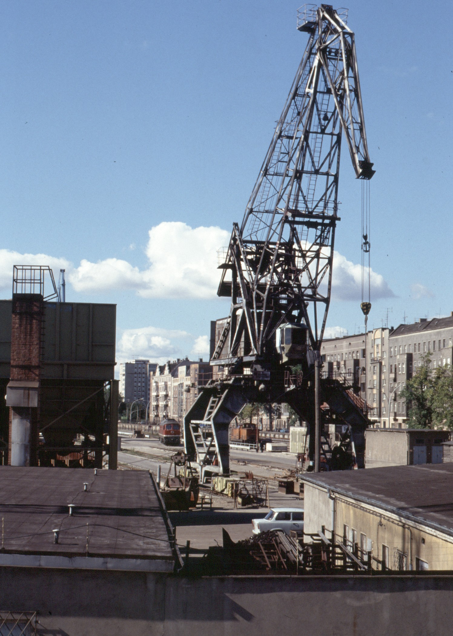 Osthafen Berlin, Kran und Gleisanlagen